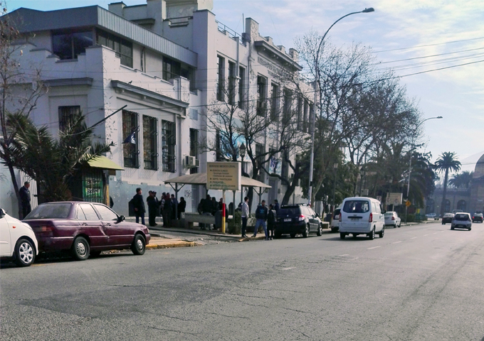 Avenida La Paz entre las calles Santos Dumont y Profesor Zañartu, sector Servicio Médico Legal.